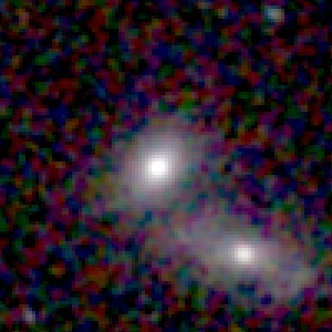 Galaxy NGC 78 B